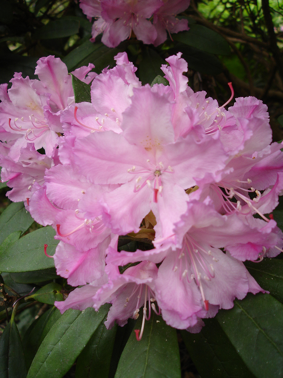 Rhododendron smirnowii